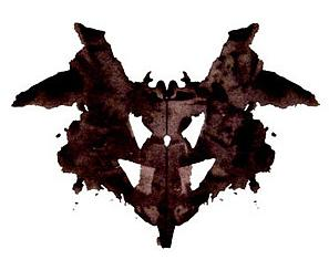 Mancha creada por HermannRorschach